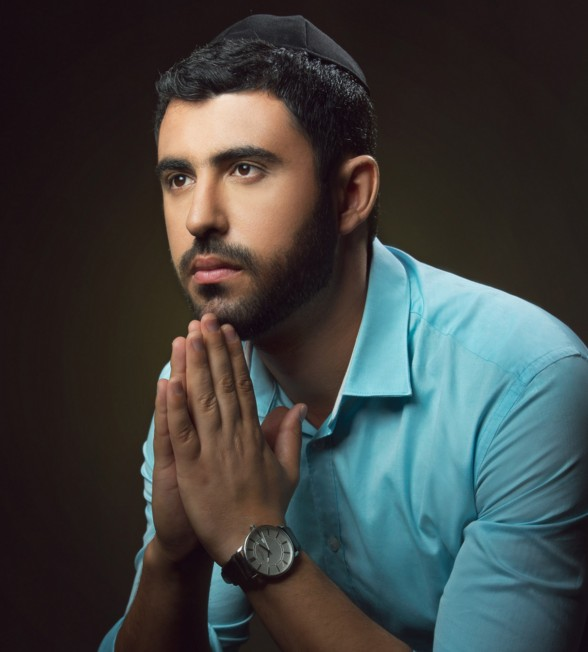 תמונה